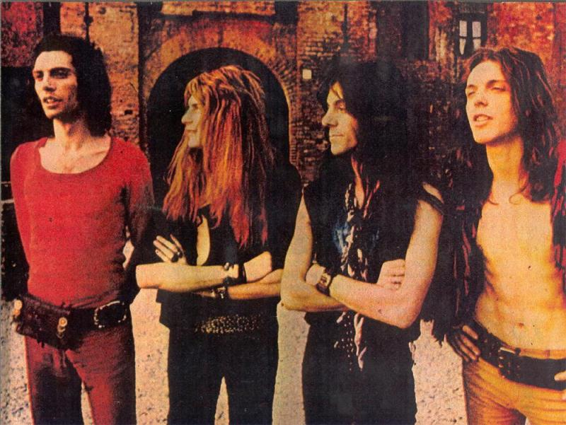 Italian progressive rock group Balletto di Bronzo photographed in Milan in 1972. From left to right: Giancarlo "Gianchi" Stinga, Gianni Leone, Lino Ajello and Vito Manzari.